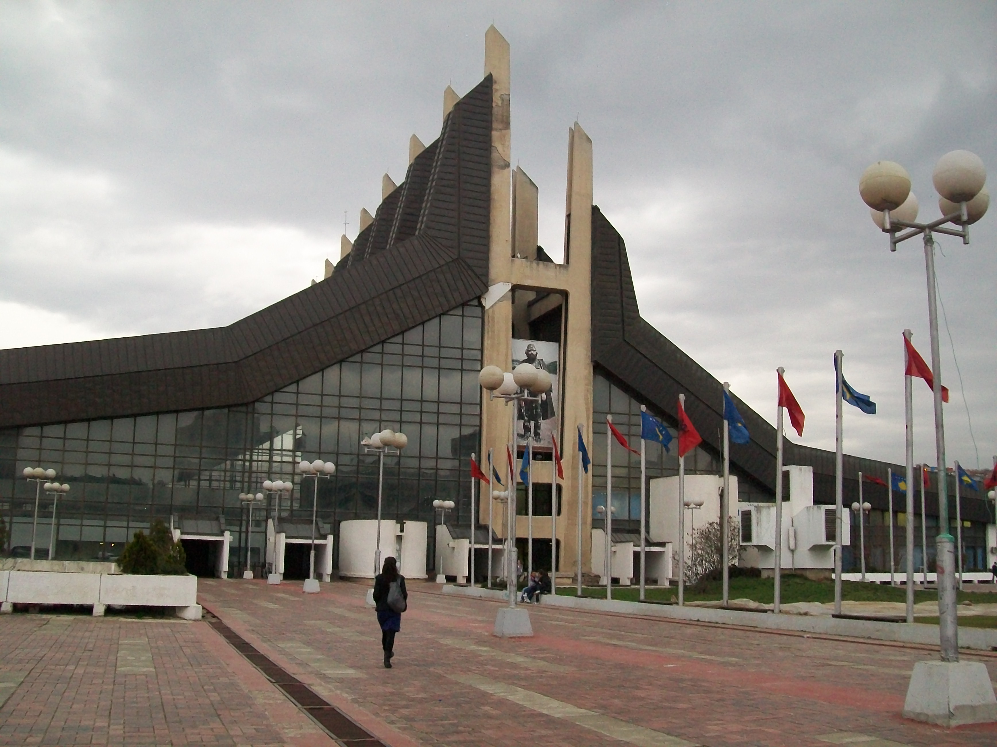 Një pamje mbi pallatin e rinisë dhe të sporteve në Prishtinë